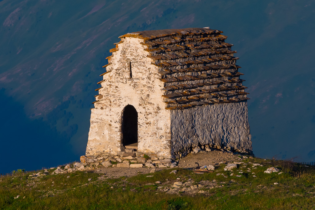 Древний ингушский храм Мят-Сели на горе Мятлоам